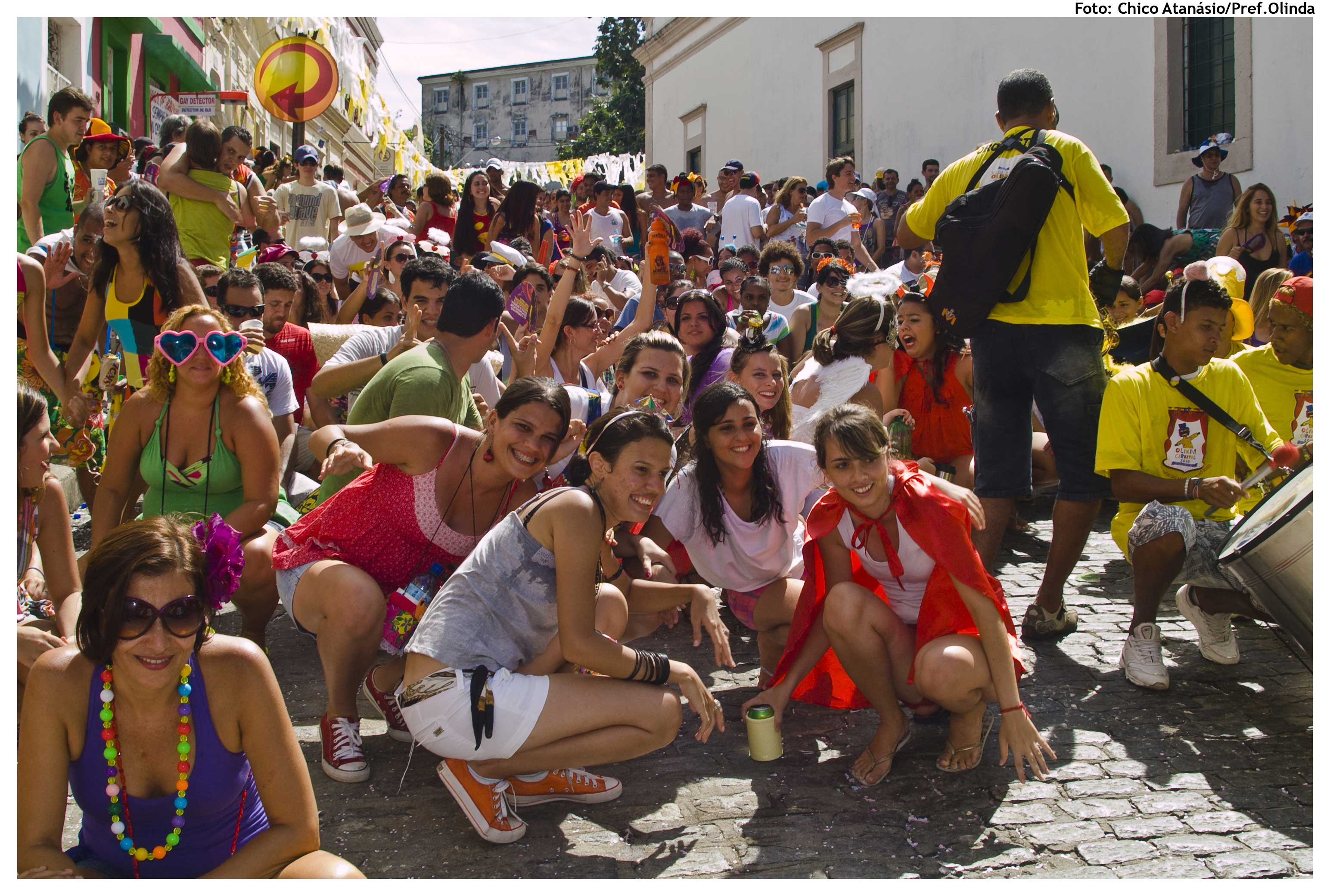 Foto: Chico Atanásio/Pref.Olinda